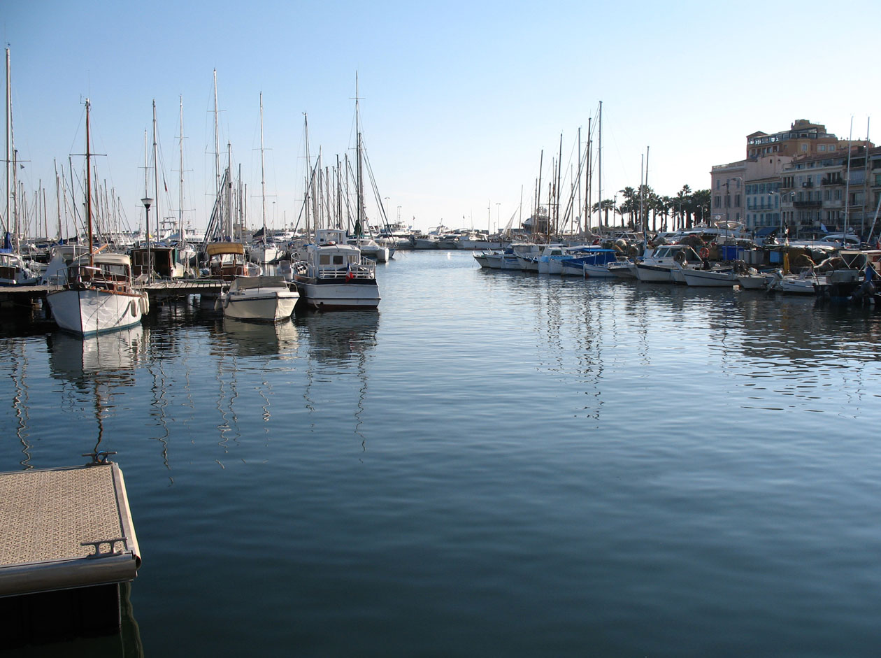 Vieux port, Cannes, France